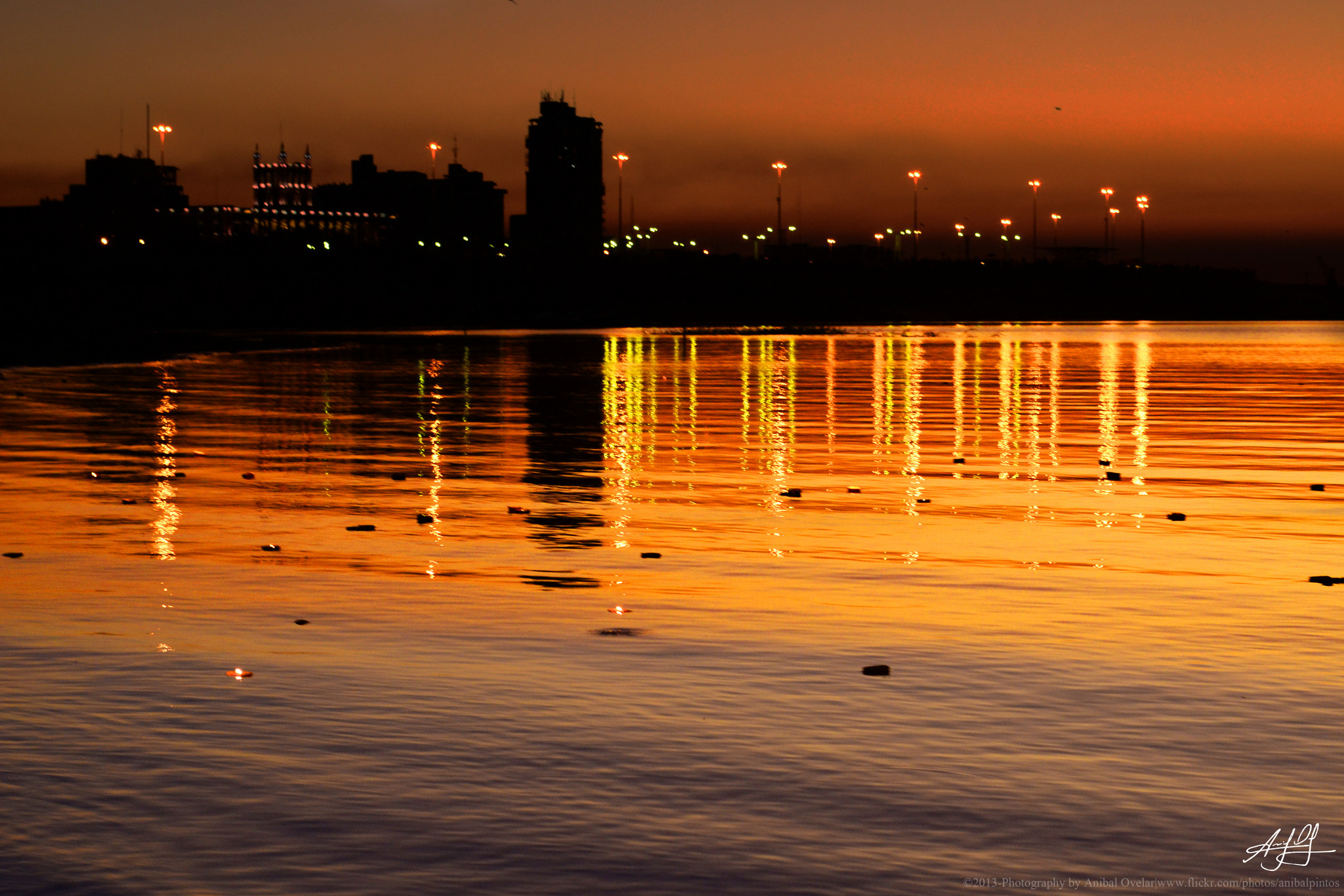 500px provided description: Atardecer en la costanera de Asunci?n [#landscape ,#paisaje ,#atardecer ,#paraguay ,#asuncio]